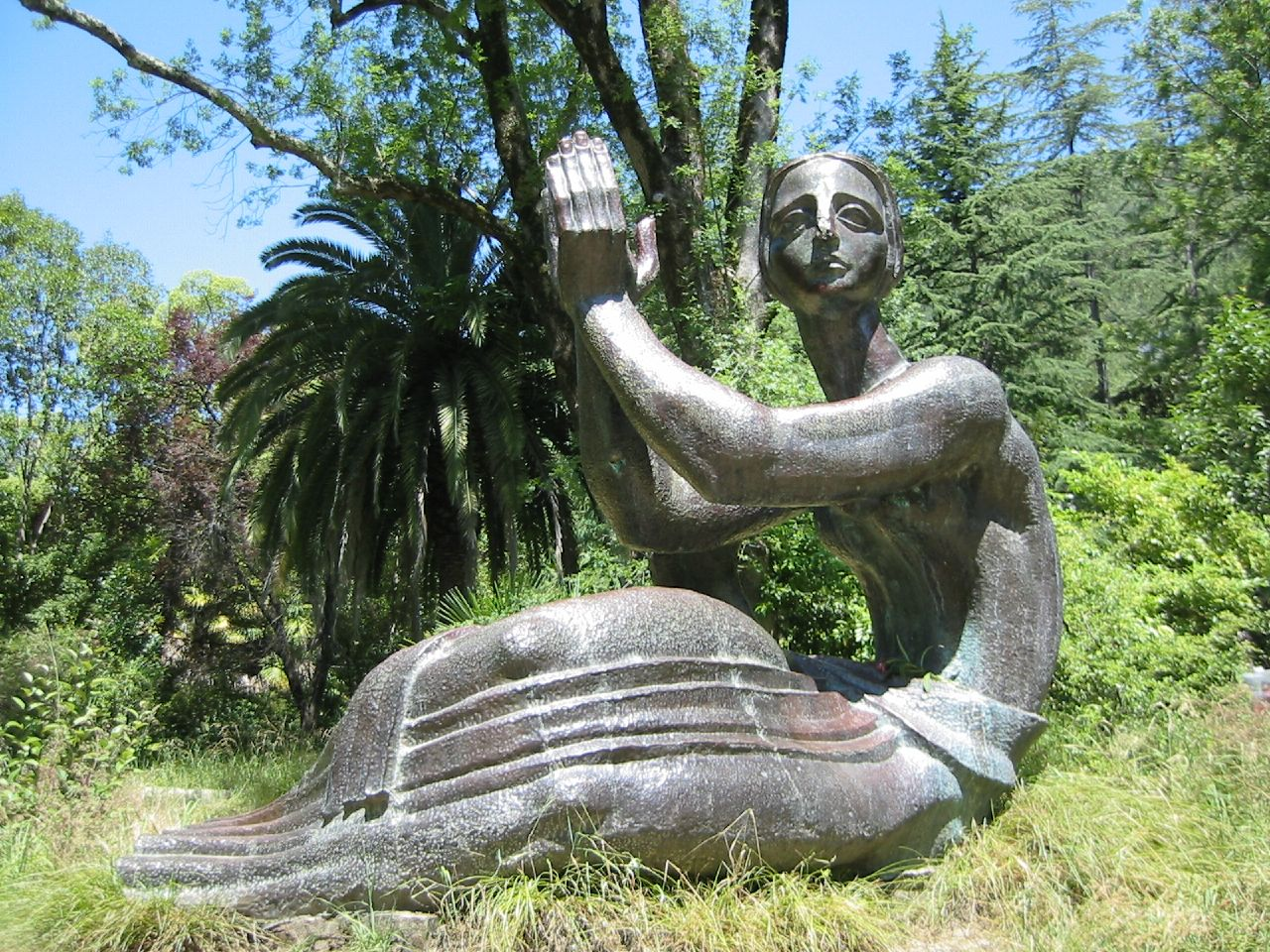 Sculpture in Gagra